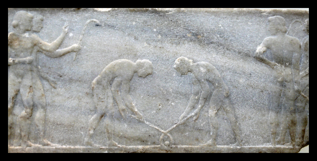 κερητίζειν